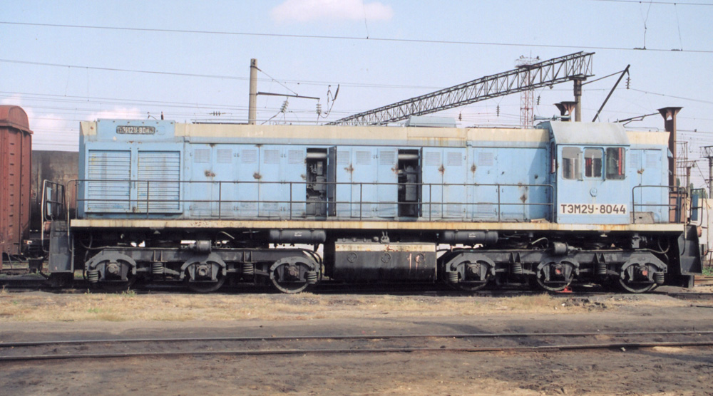 Тепловоз ТЭМ2У-80400 в депо Аткарск